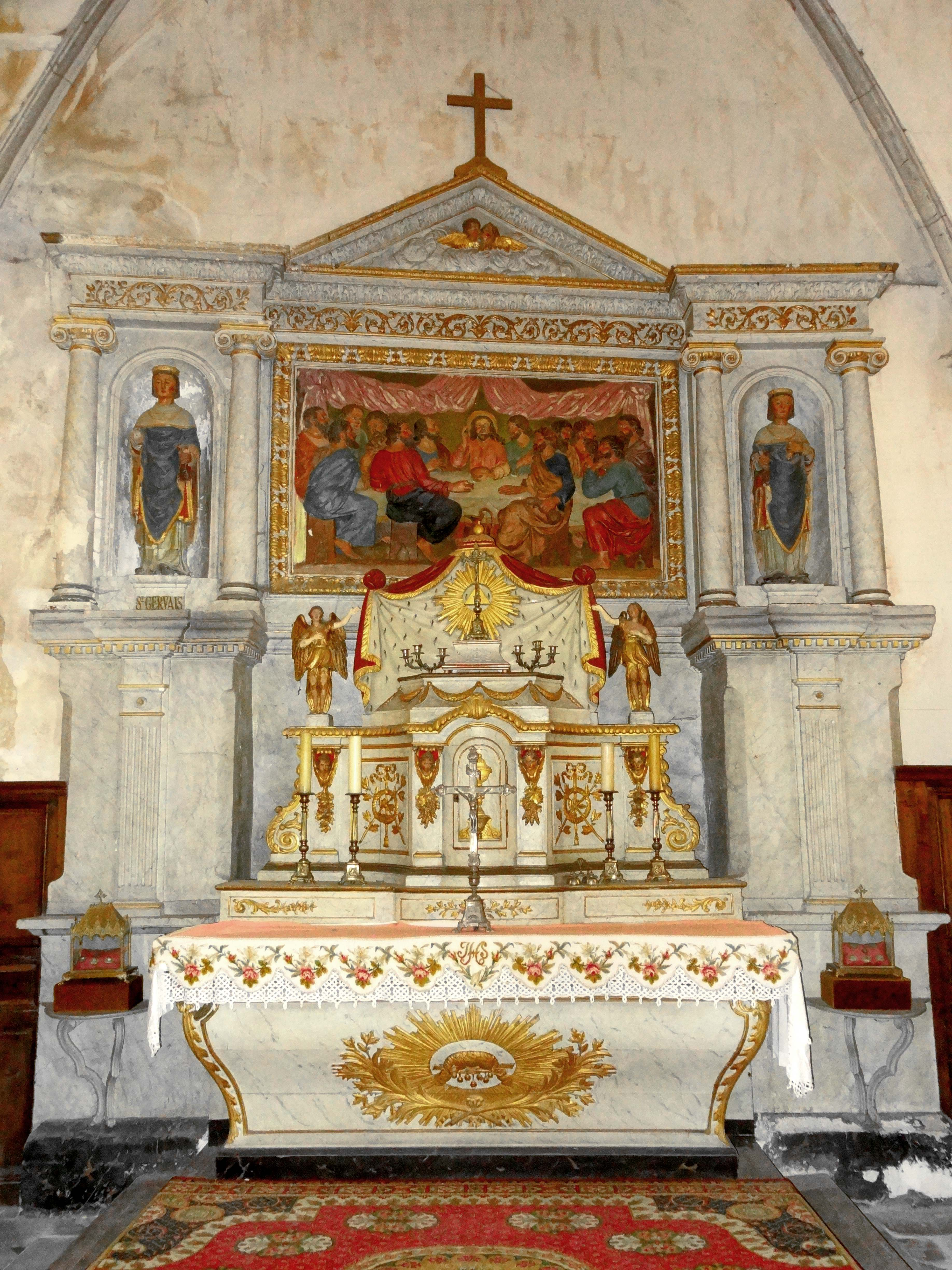 Mobilier de l'église - voir titre.